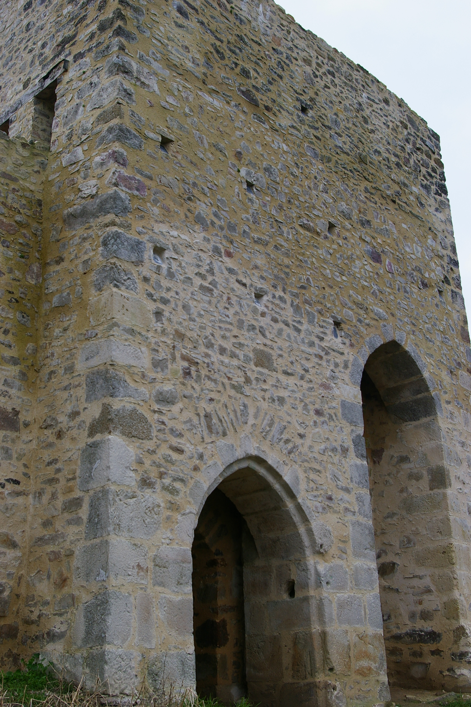 Porte de fer à Sainte-Suzanne (Mayenne)